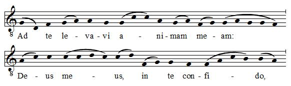 Интроит "Ad te levavi" (фрагмент, транскрипция)